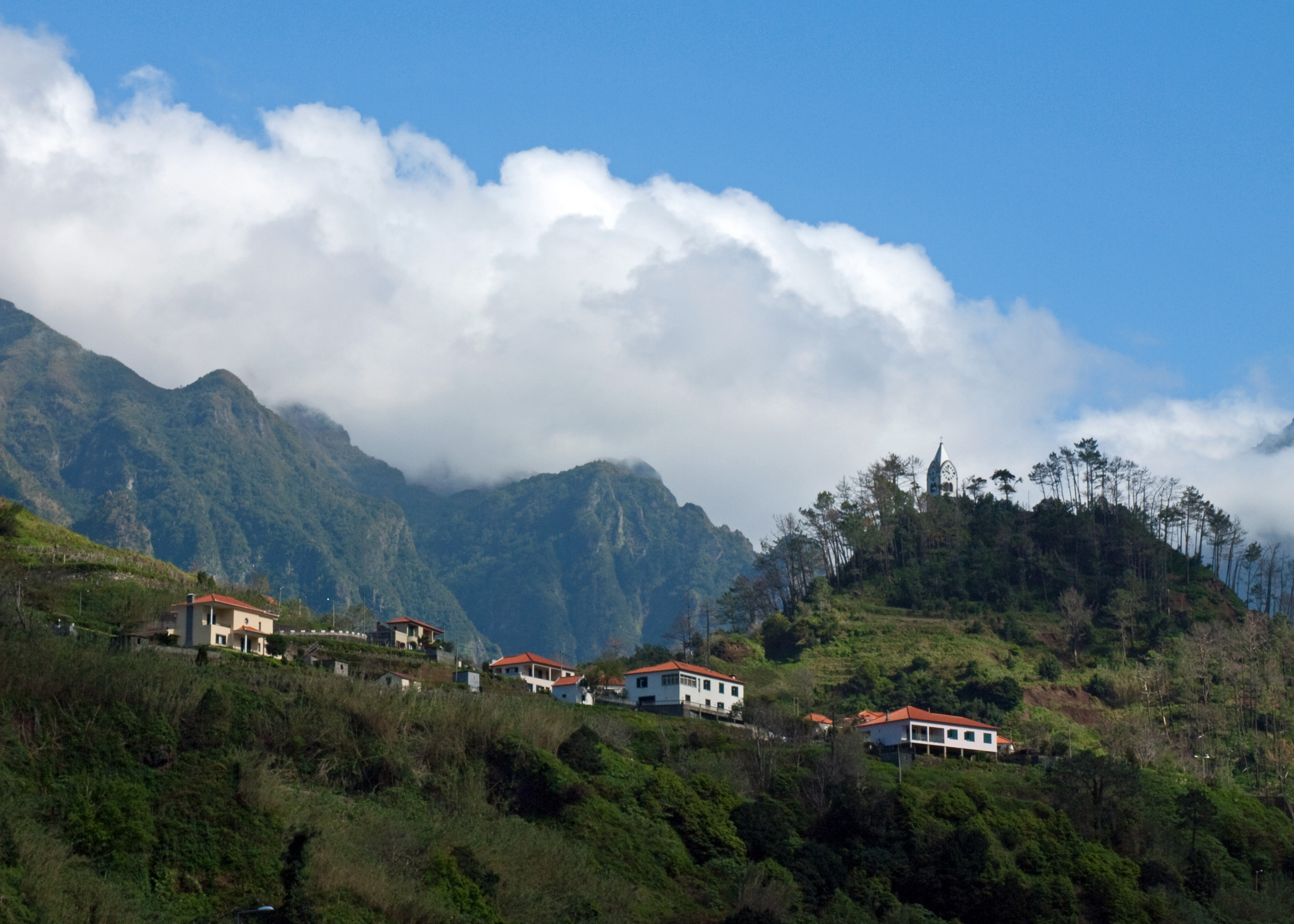 Pico da Cova, São Vicente, Madeira